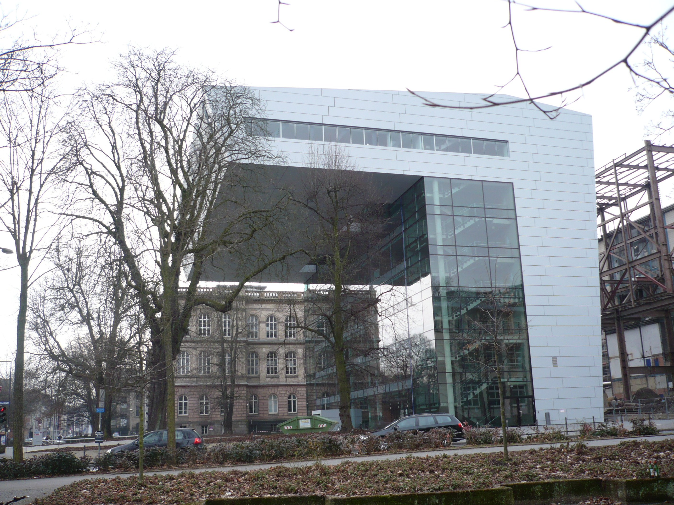 Sogenanntes "Super C", Gebäude der RWTH in Aachen, im Hintergrund das Hauptgebäude der RWTH